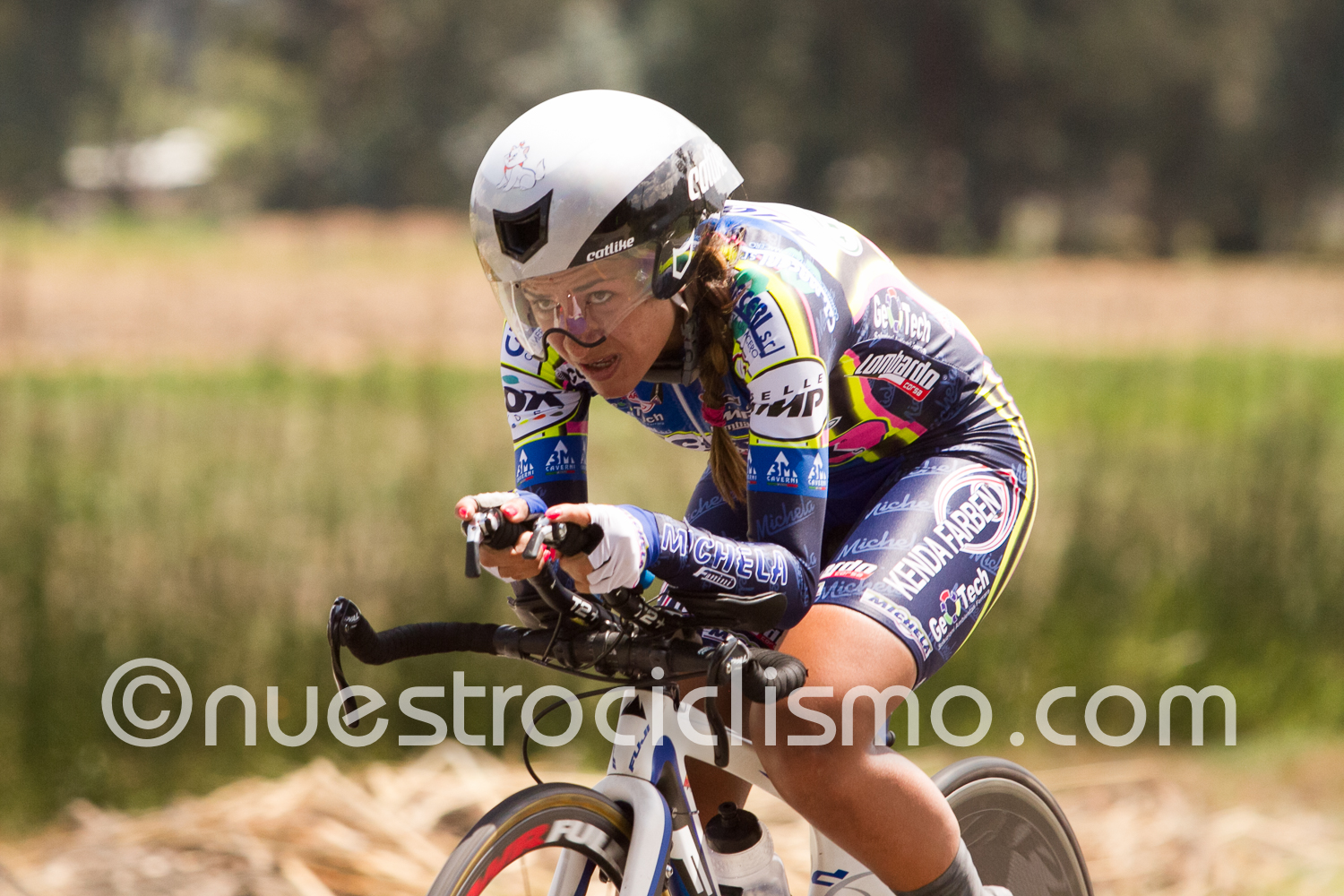 Jueves 18 de febrero de 2016